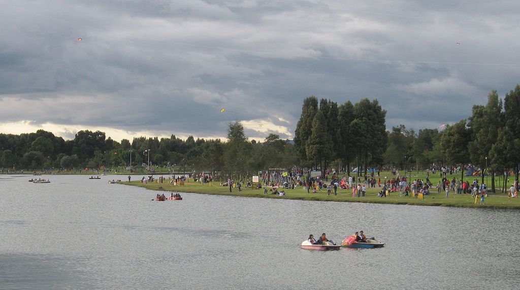 Monserrate